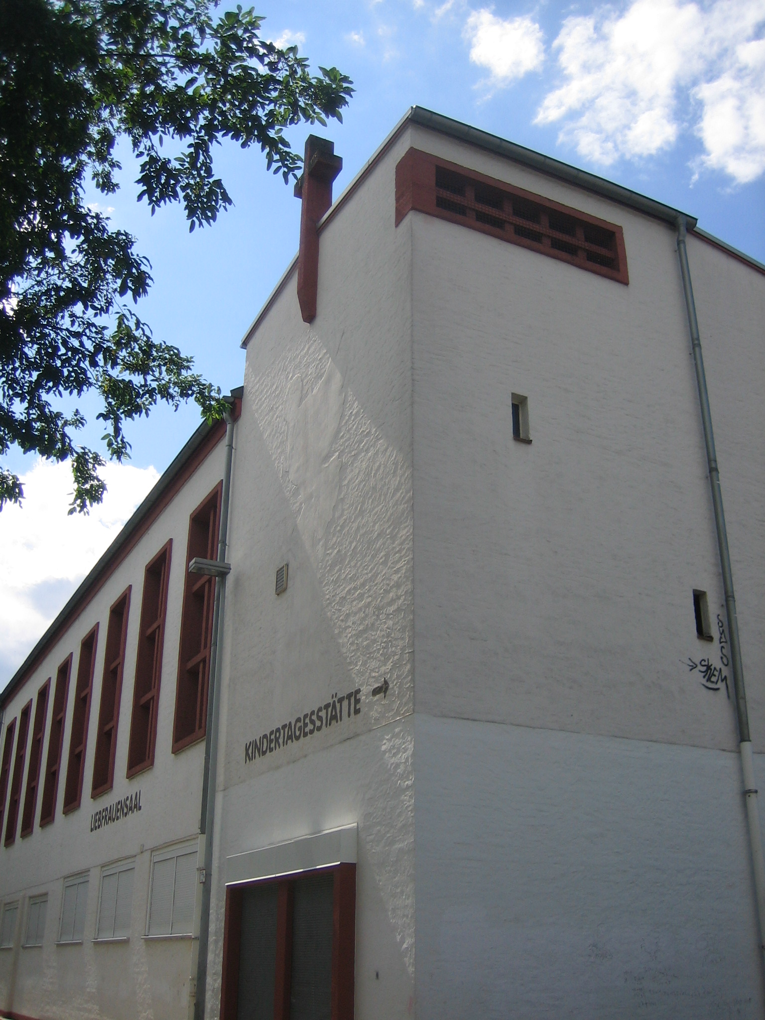 Die Glocken waren in der Vorhalle des Gemeindehauses untergebracht, die Schallöffnungen liegen erhöht oberhalb des flachen Notkirchendachs.